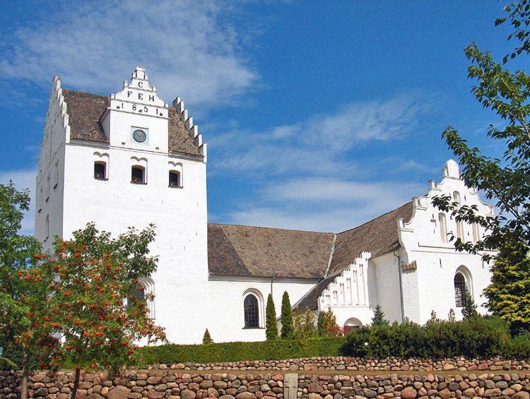 fra syd